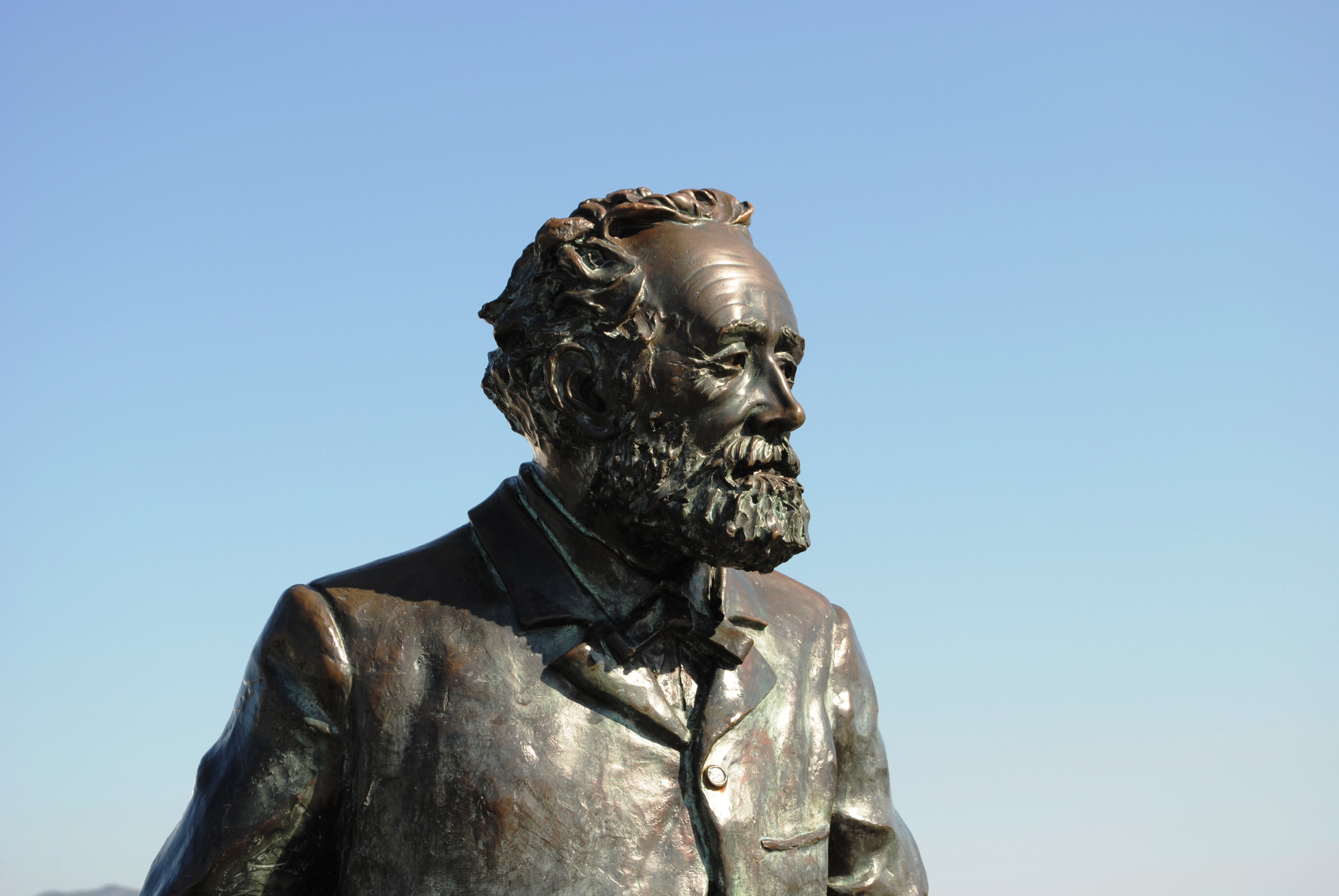 Monumento a Jules Verne